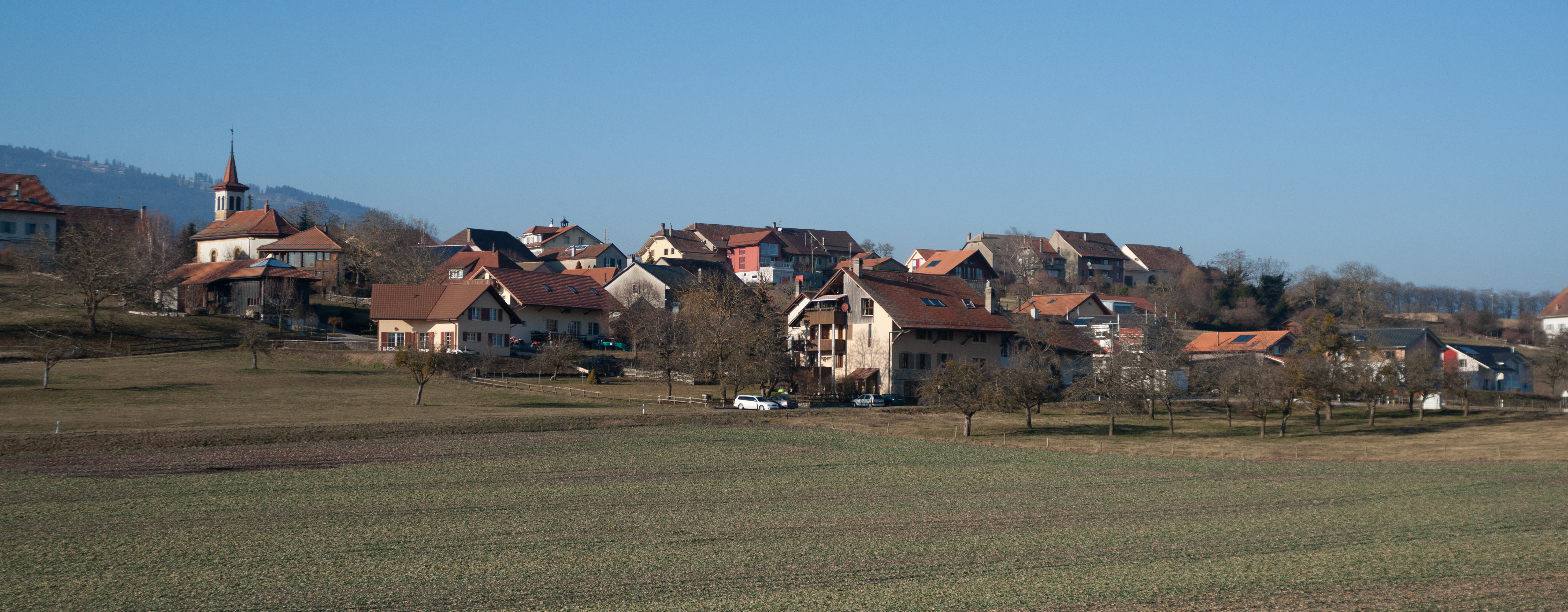 Chevilly, canton de Vaud, Suisse.